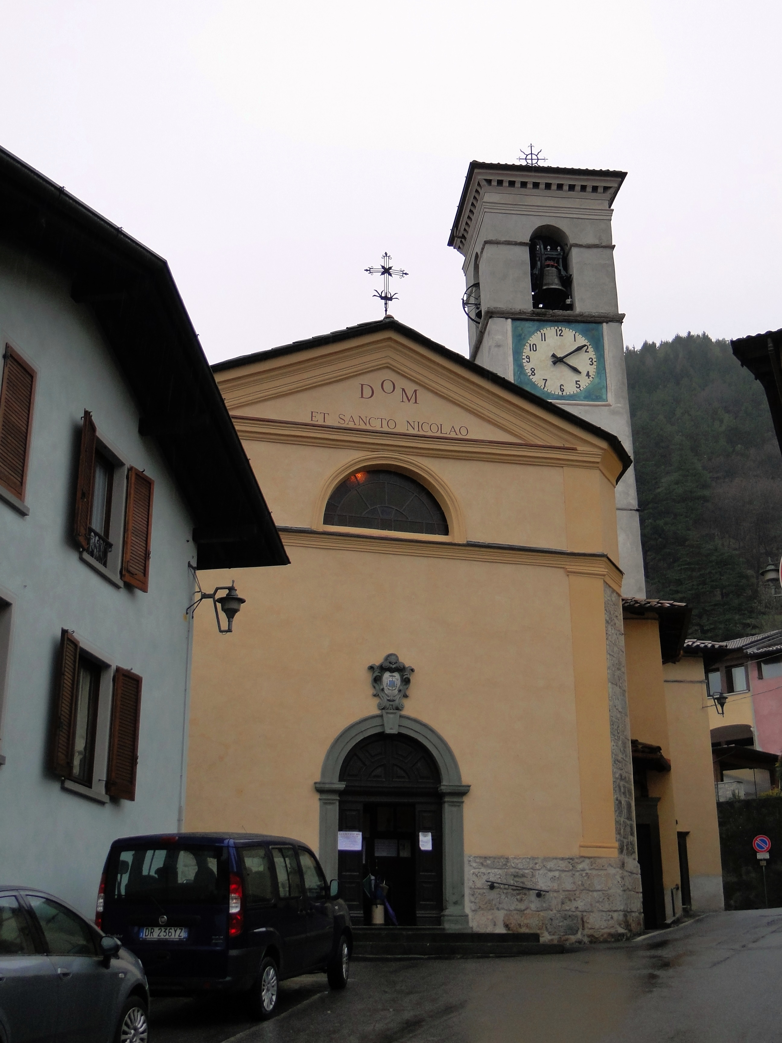 Barzizza, fraz. di Gandino (BG). Chiesa parrocchiale di san Nicola